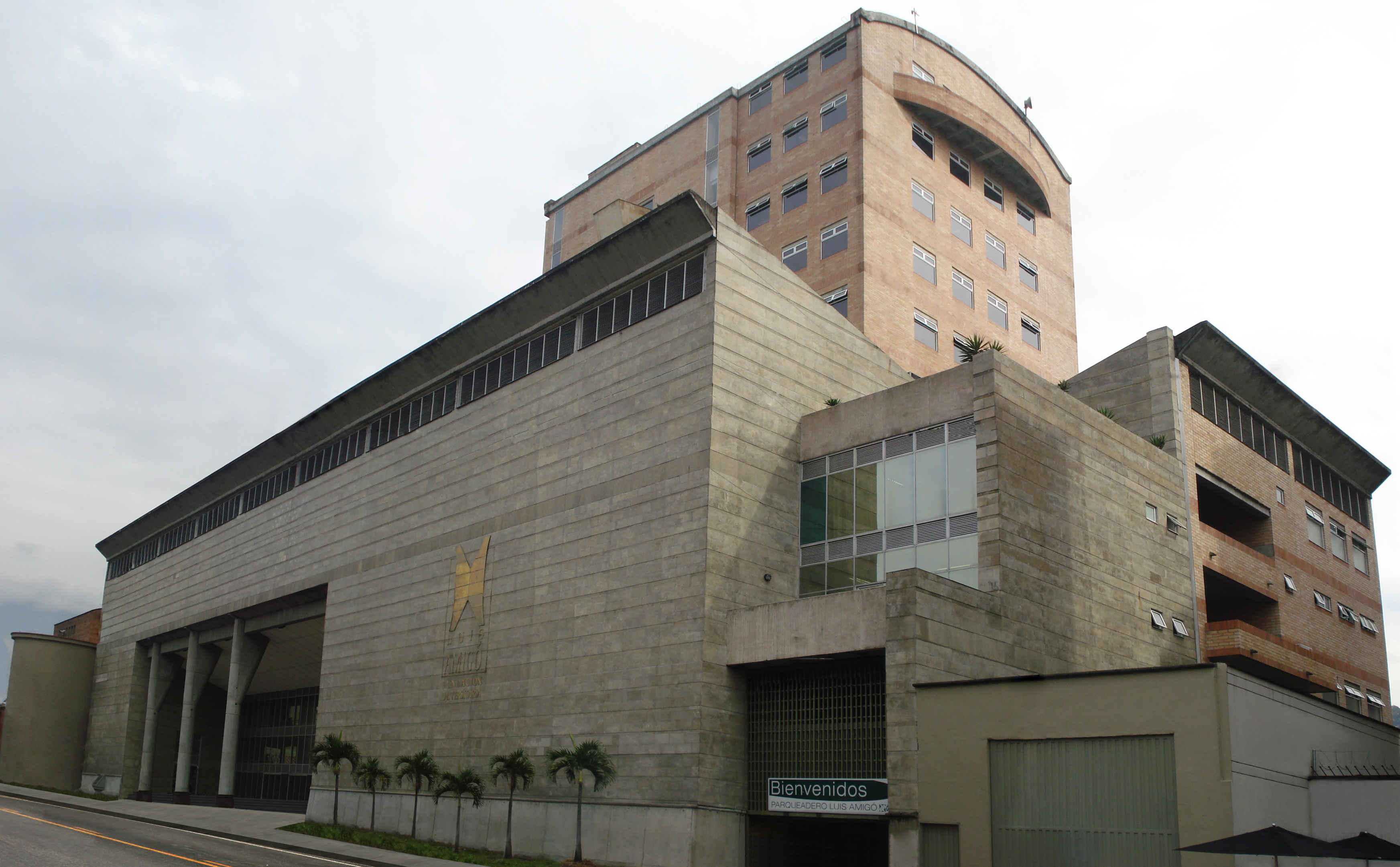 Fundación Universitaria Luis Amigó